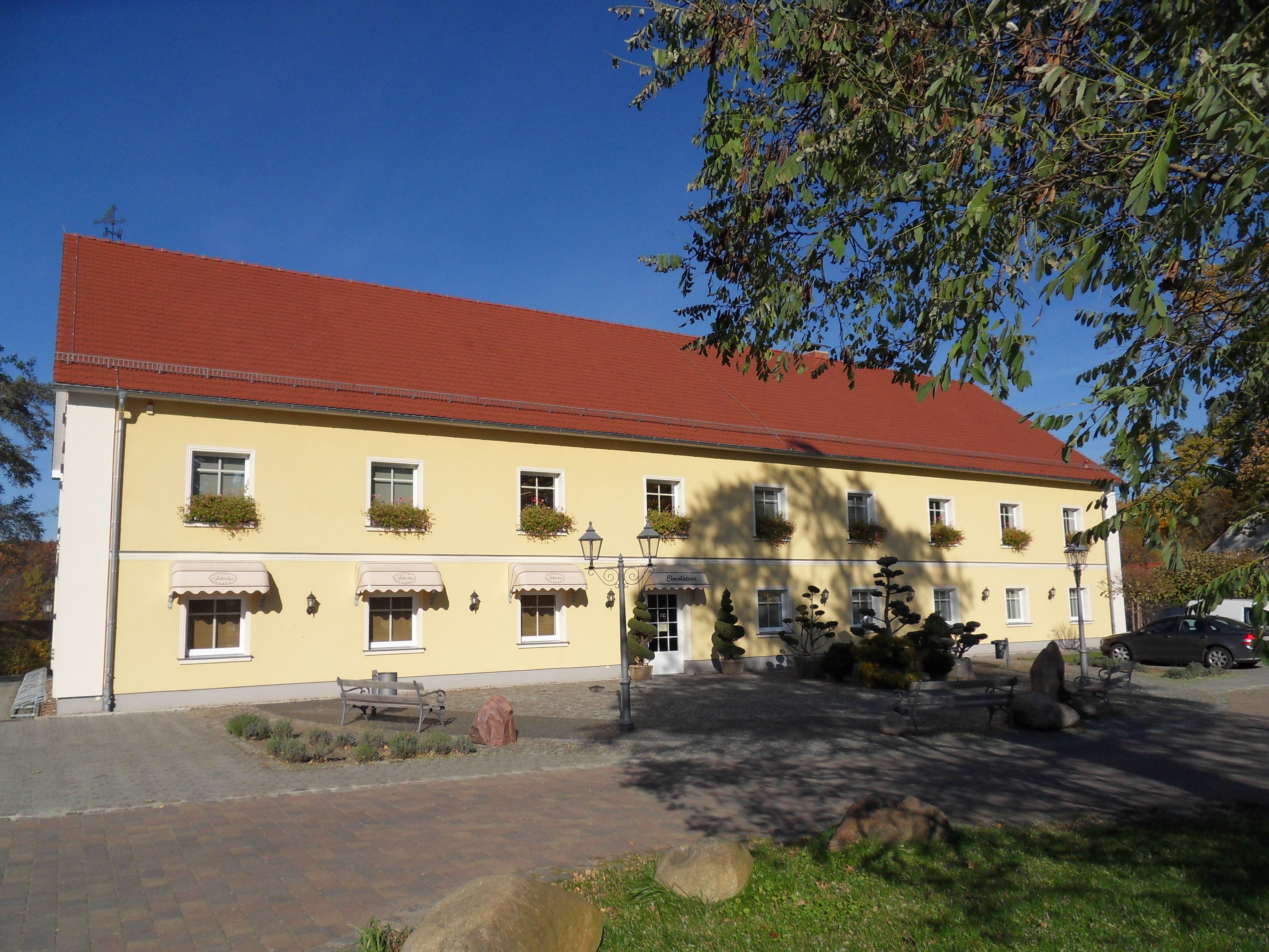 Schokoladenfabrik in Hornow